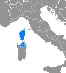 Idioma corso